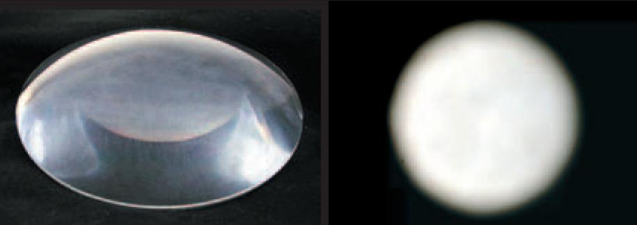 Lentille PC claire - Bensti (d) 25 mars 2008 à 22:31 (CET)